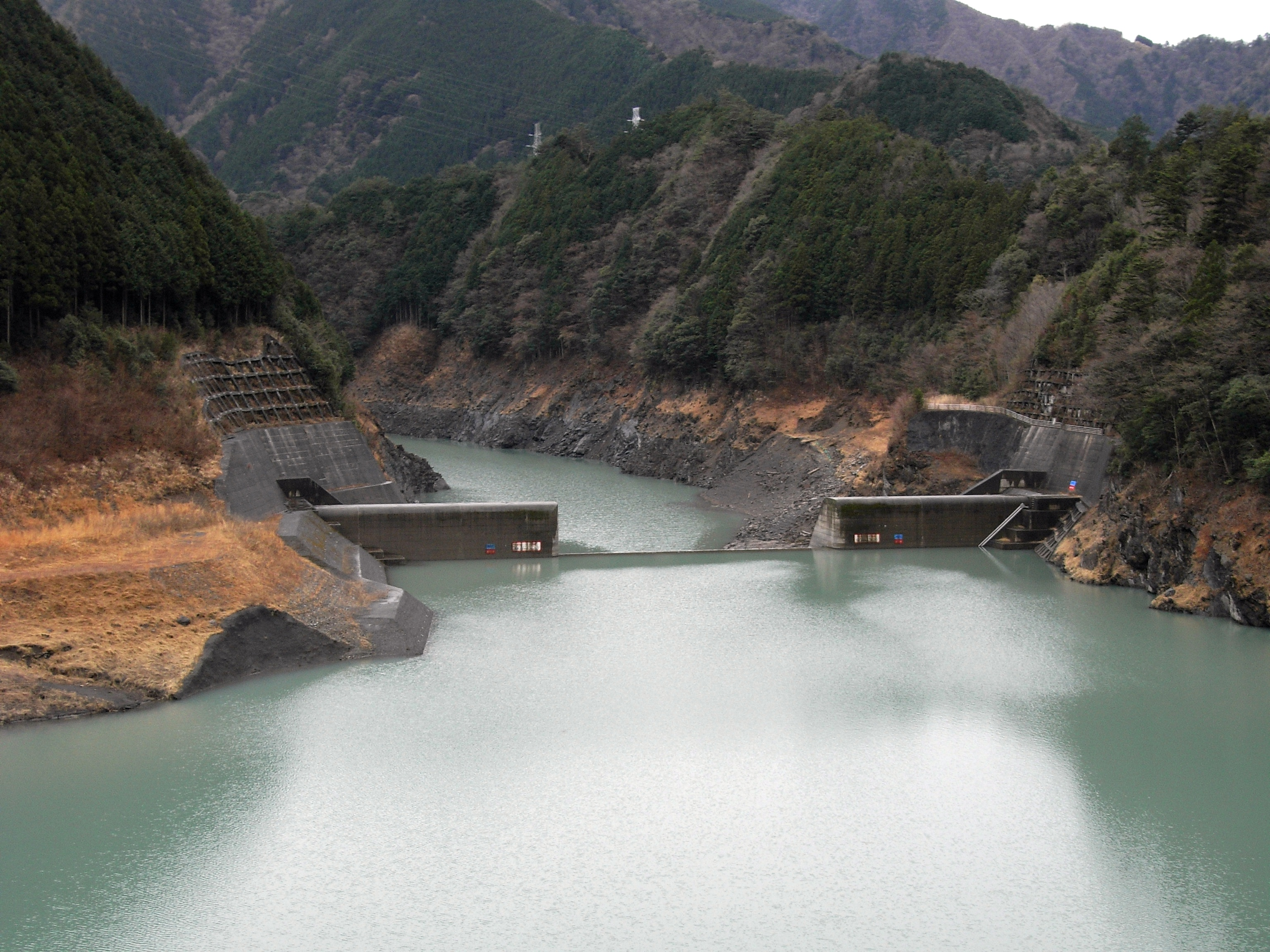 Dam